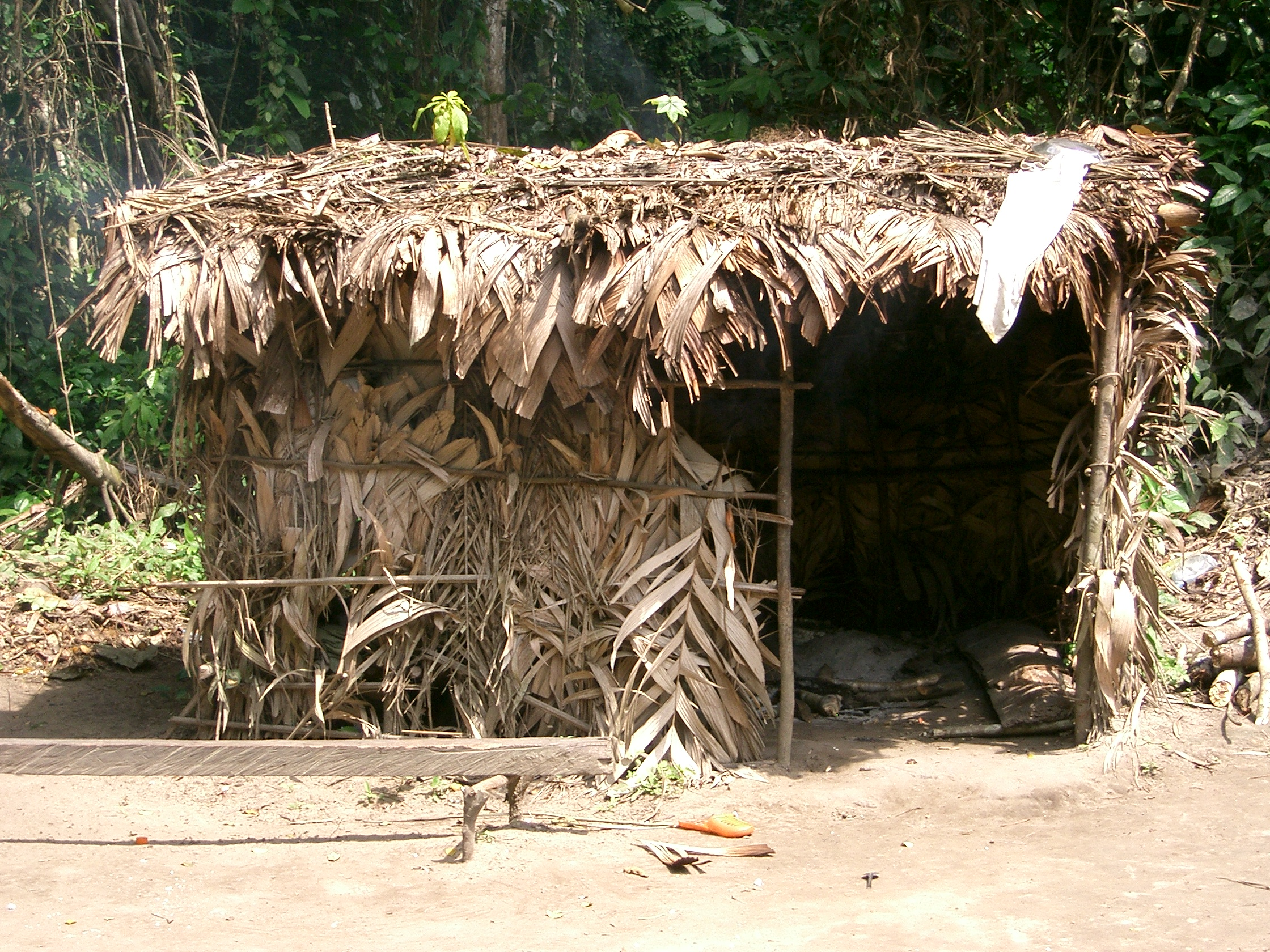 Afrique : case pygmée . Cameroun - rivière Lobé